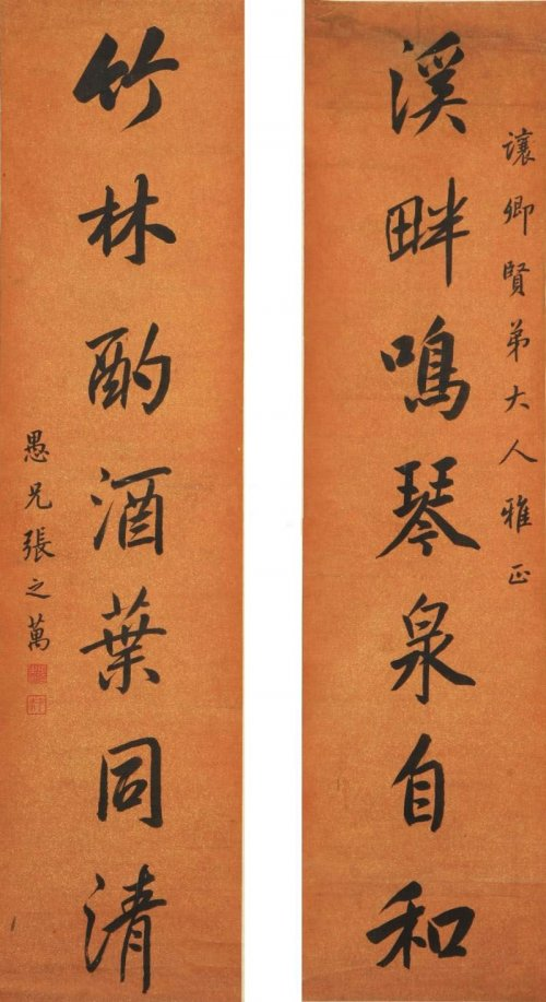 中文（香港）: 張之萬對聯